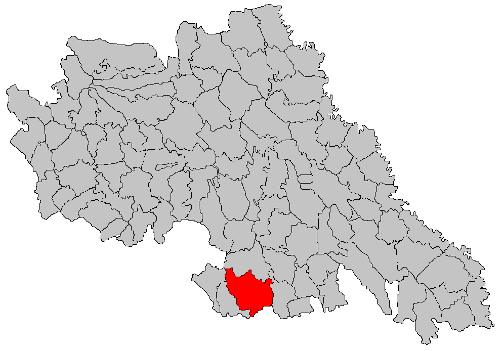 Categorie:Hărţi ale judeţului Iaşi